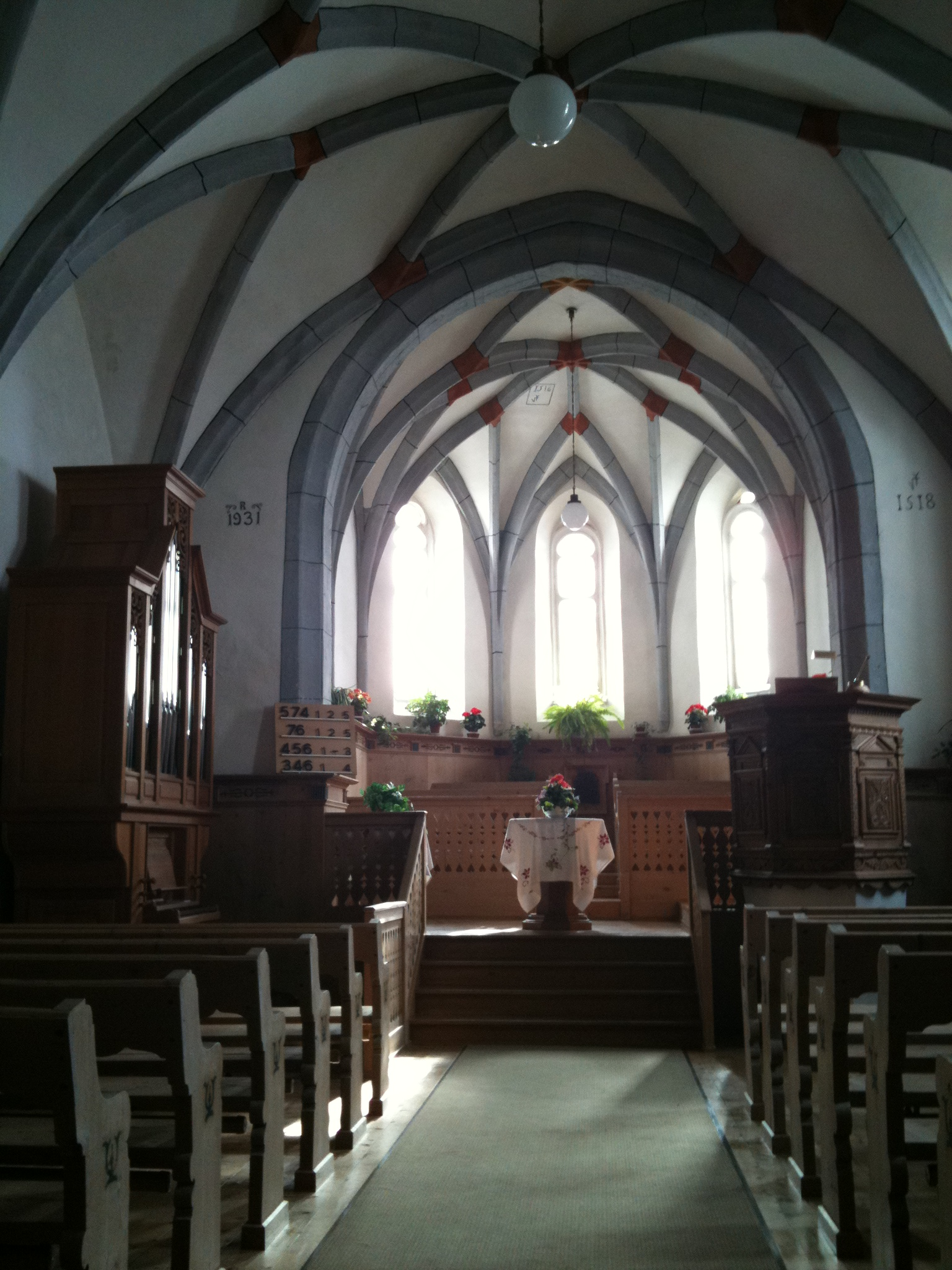 reformierte Kirche Conters im Prättigau (Kanton Graubünden), Innenansicht